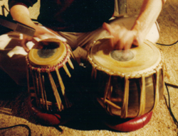 nogmaals: ikzelf op de tabla